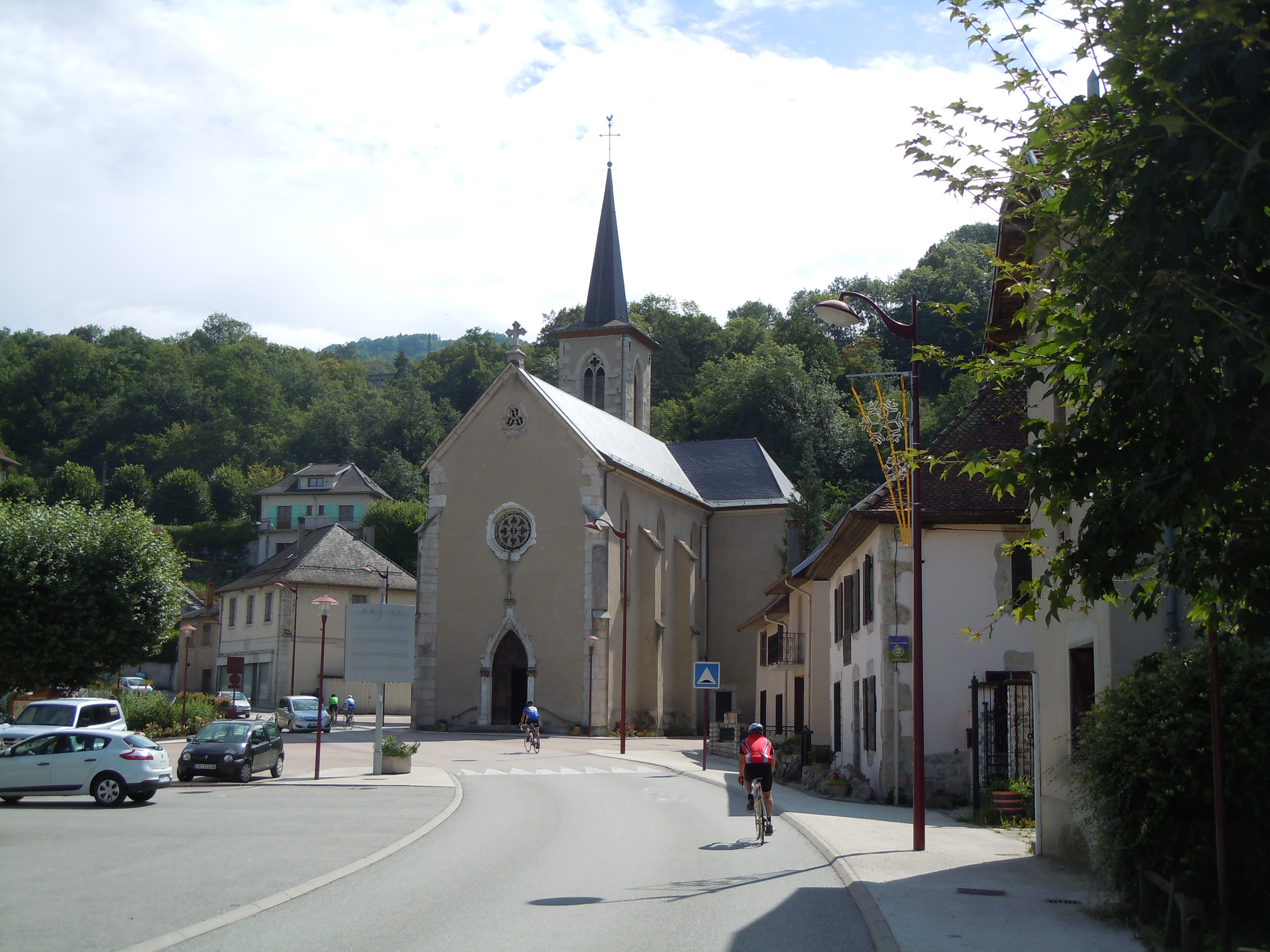 Eglise Saint-Pierre - La Bridoire - Savoie France